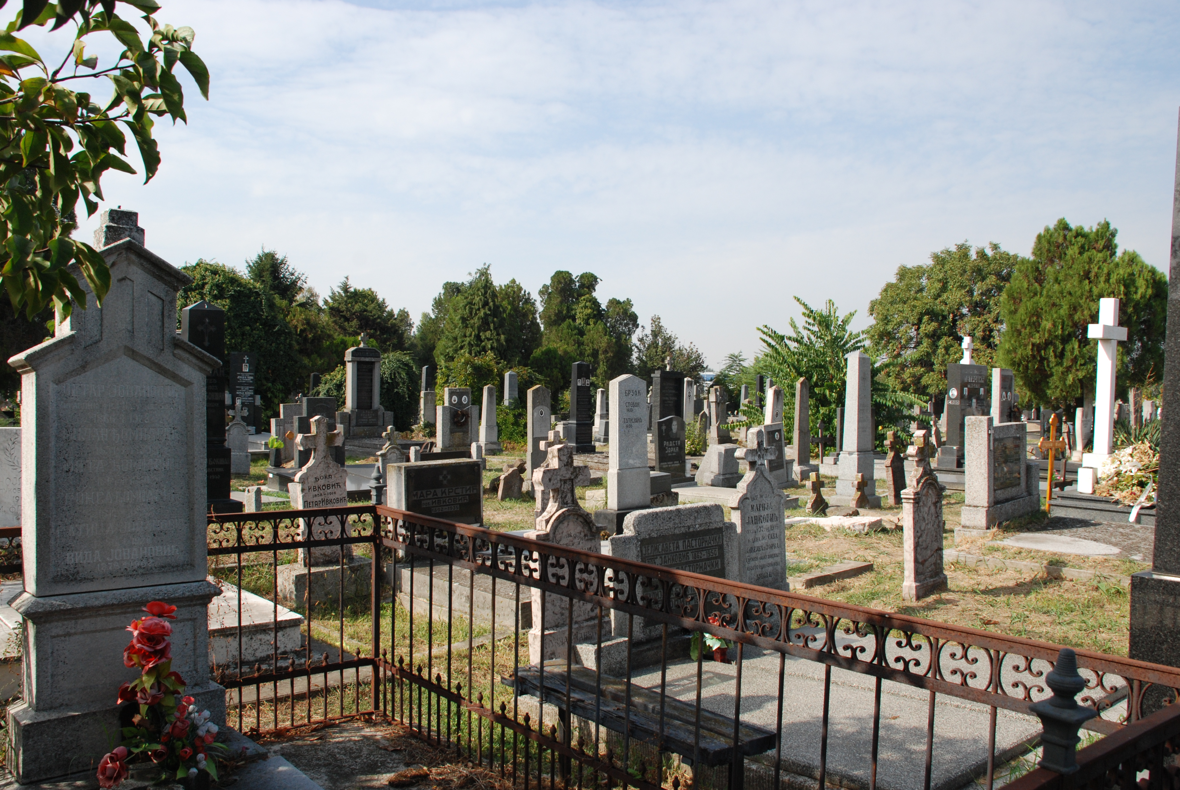 Алмашко гробље